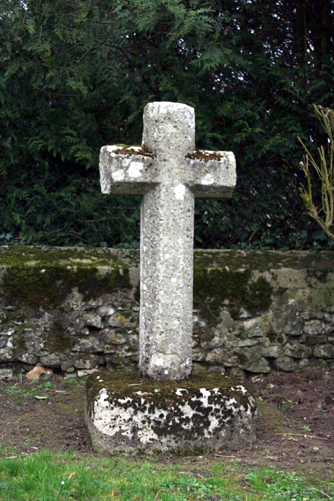 Croix à Saint-Germain-de-la-Grange - Yvelines (France). Cette croix marque l'emplacement de l'église brûlée en 1789.